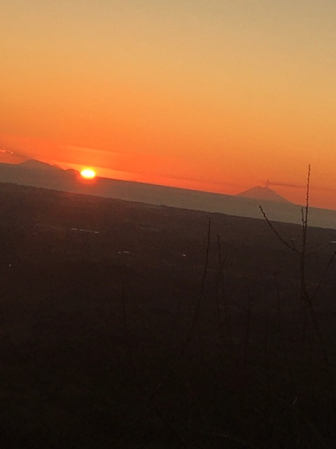 Tramonto golfo